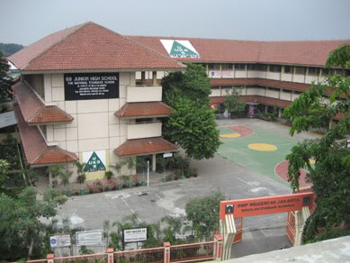 gedung sekolah smpn 68 jakarta